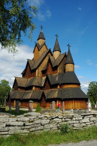 Stavkirke de Heddal